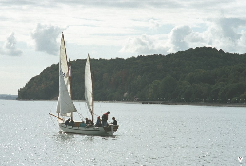 Ketch type DZ 2